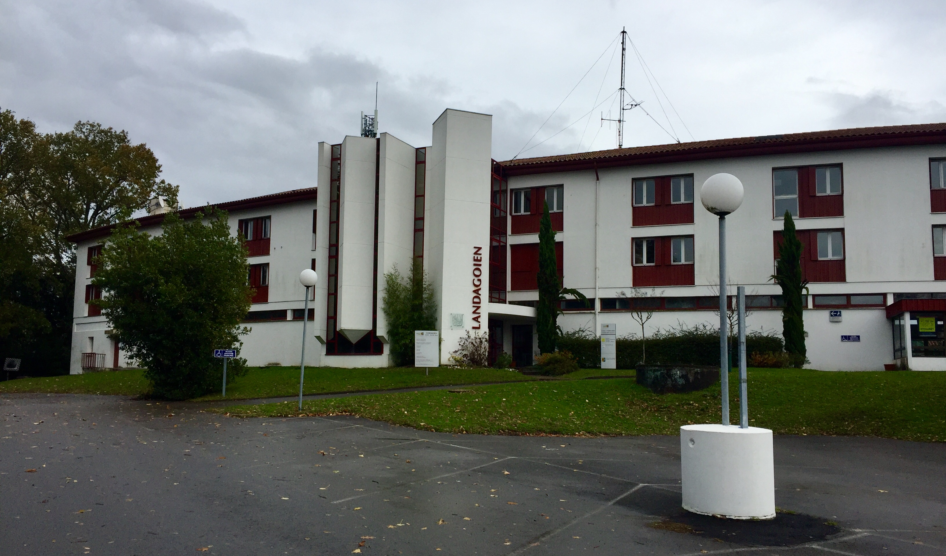 Ustaritzeko etxea.